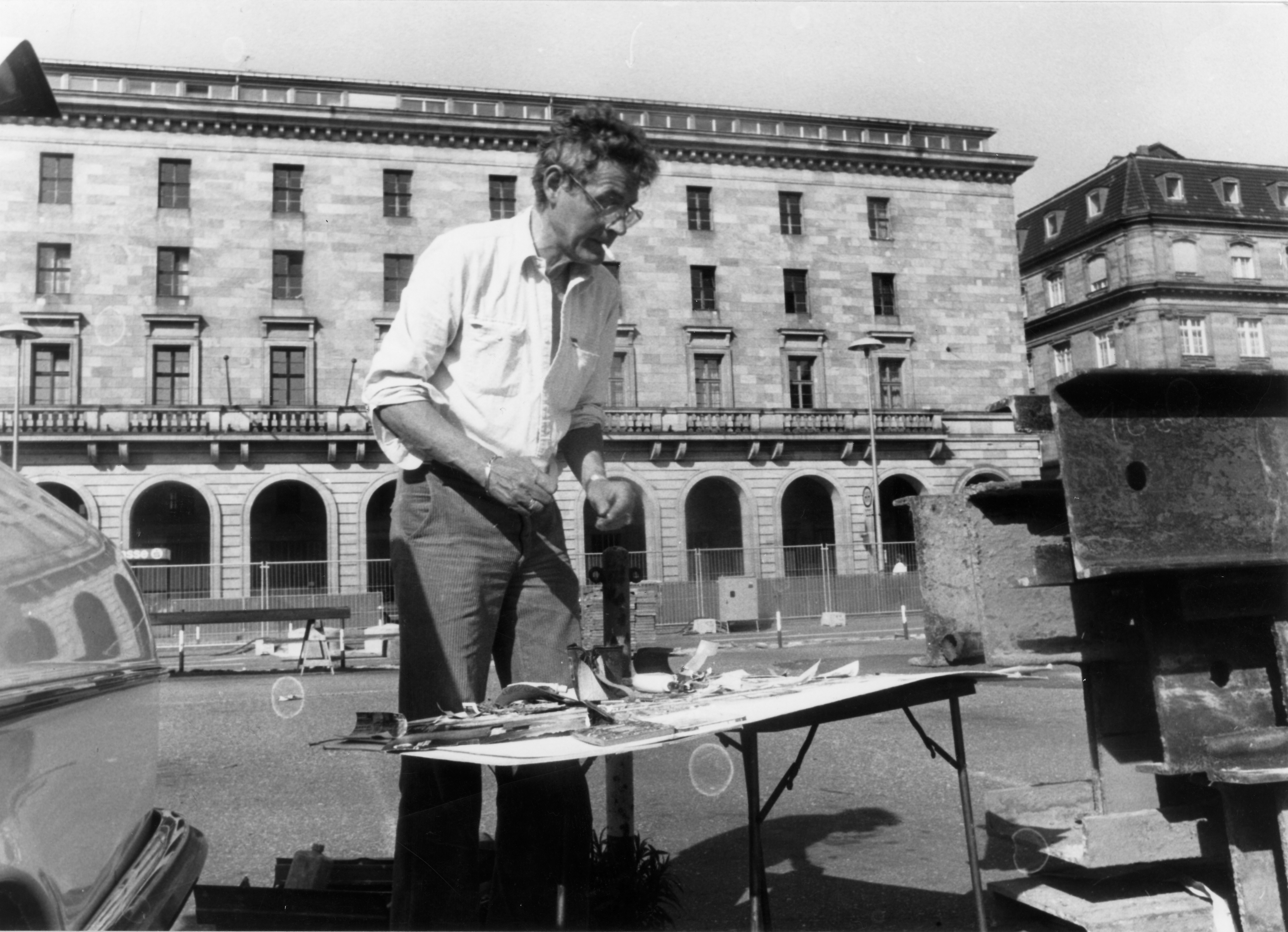 Quelle K. Nüssle, frei für alle, Beschreibung: Norbert Nüssle beim Arbeit auf D5 Mannheim (Neubau REM), 1985